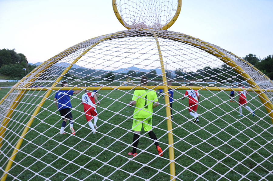 Изглед главне капије са обручем у новом српском спорту Вилбалу.